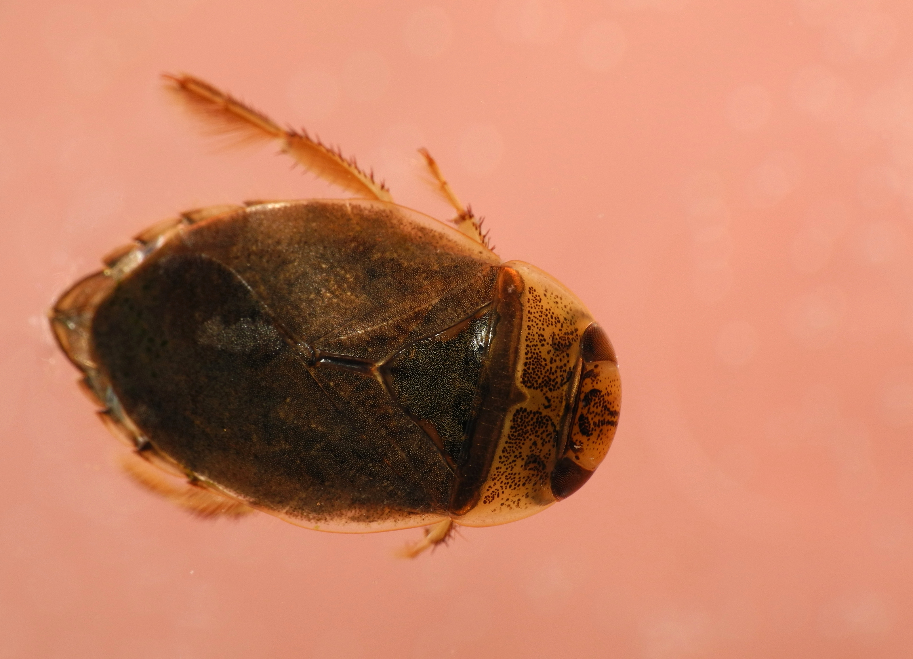 Naucore (Naucoridae sp.). Image prise avec la bonnette Raynox DCR-250.